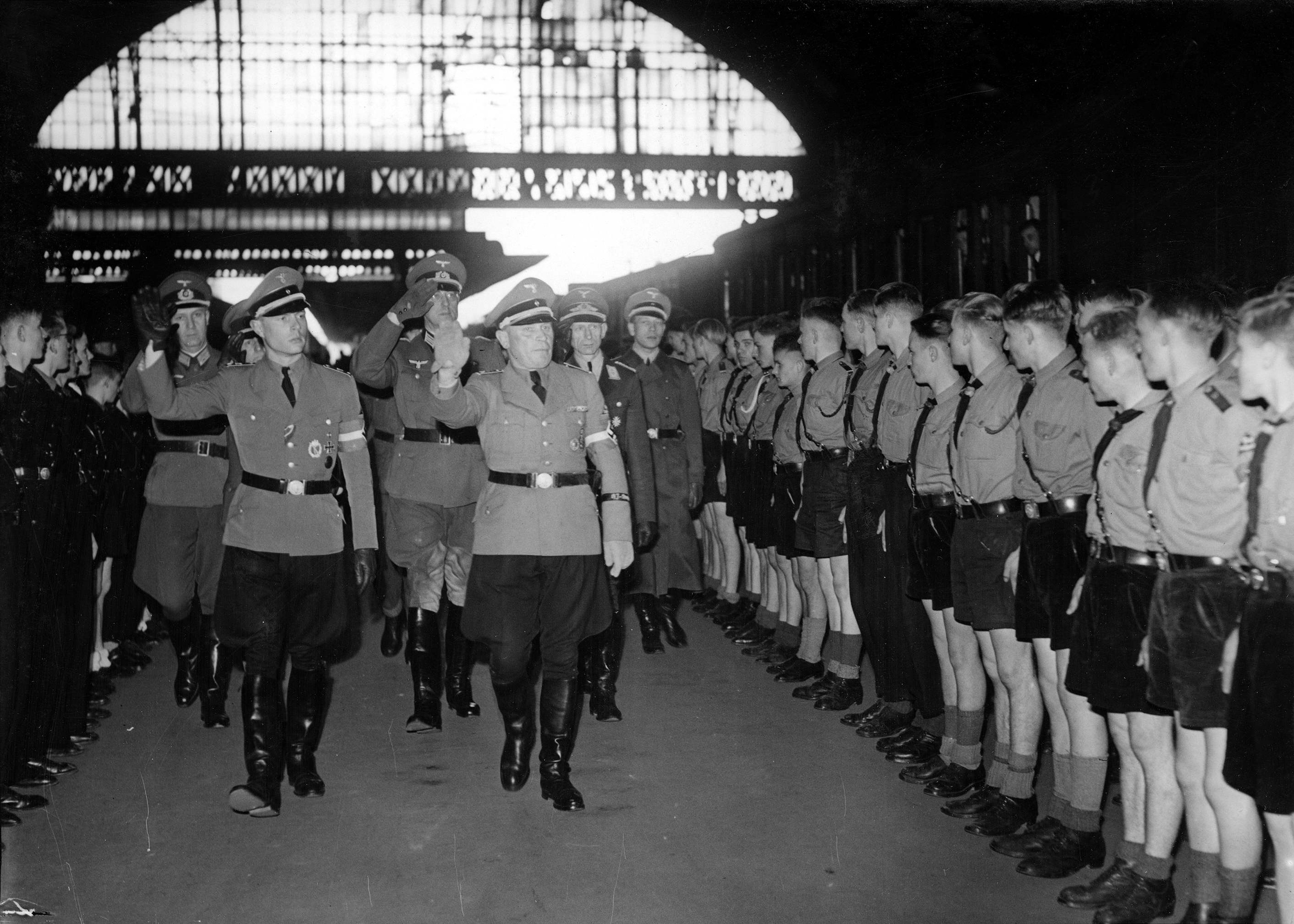 La plantation de l'arbre de mai, organisée par l'institut flamand pour le folklore a eu lieu au Parc Duden à Bruxelles : 2/5/1943. Une vue générale. De meiboomplanting, ingericht door het Vlaams instituut voor folklore, greep plaats in het Dudenpark te Brussel : 2/5/1943. [3/5/1943] [Frei gegeben durch zensur] [Sipho], Accueil par la Hitlerjugend Flandern à Bruxelles d'une délégation de la Hitlerjugend allemande, 2/5/1943.